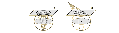 Stereograafiline ja perspektiivne projektsioon